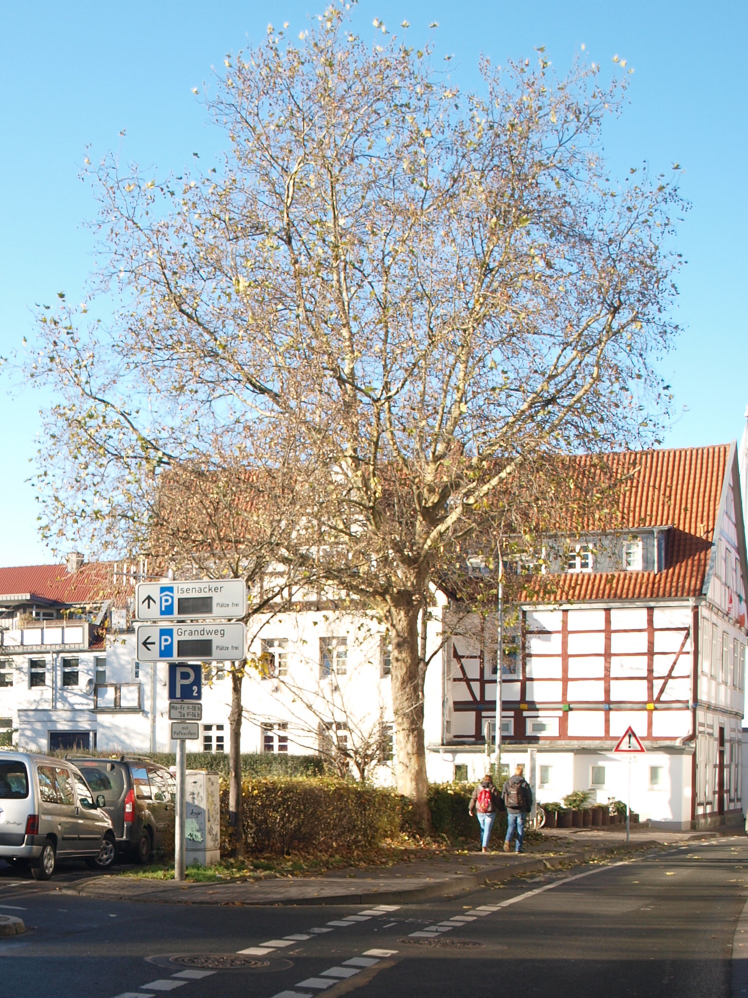 Stolpersteinlage in Soest Grandweg 30 (Haus existiert heute nicht mehr)